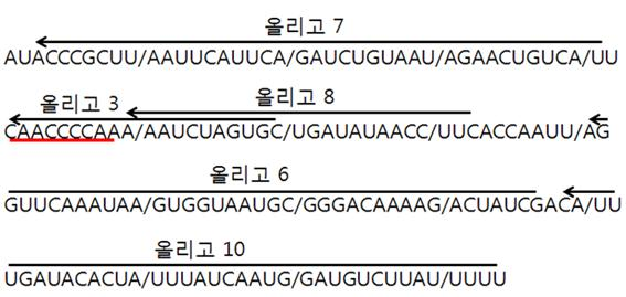 텔로머라아제의 RNA 분자인 159RNA와 그에 상보적으로 결합하고 있는 올리고 뉴클레오타이드(Nucleotides)